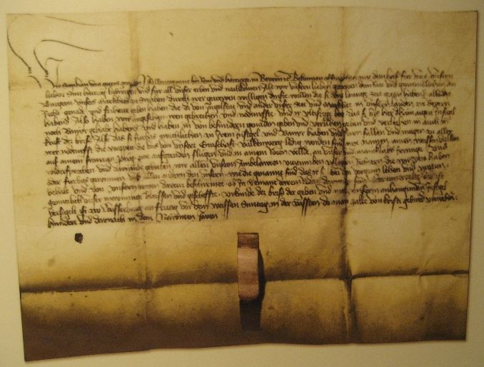 Urkunde mit der Verleihung des Ortswappens von Markt Schwaben 1409. Mit freundlicher Genehmigung des Heimatmuseums Markt Schwaben.